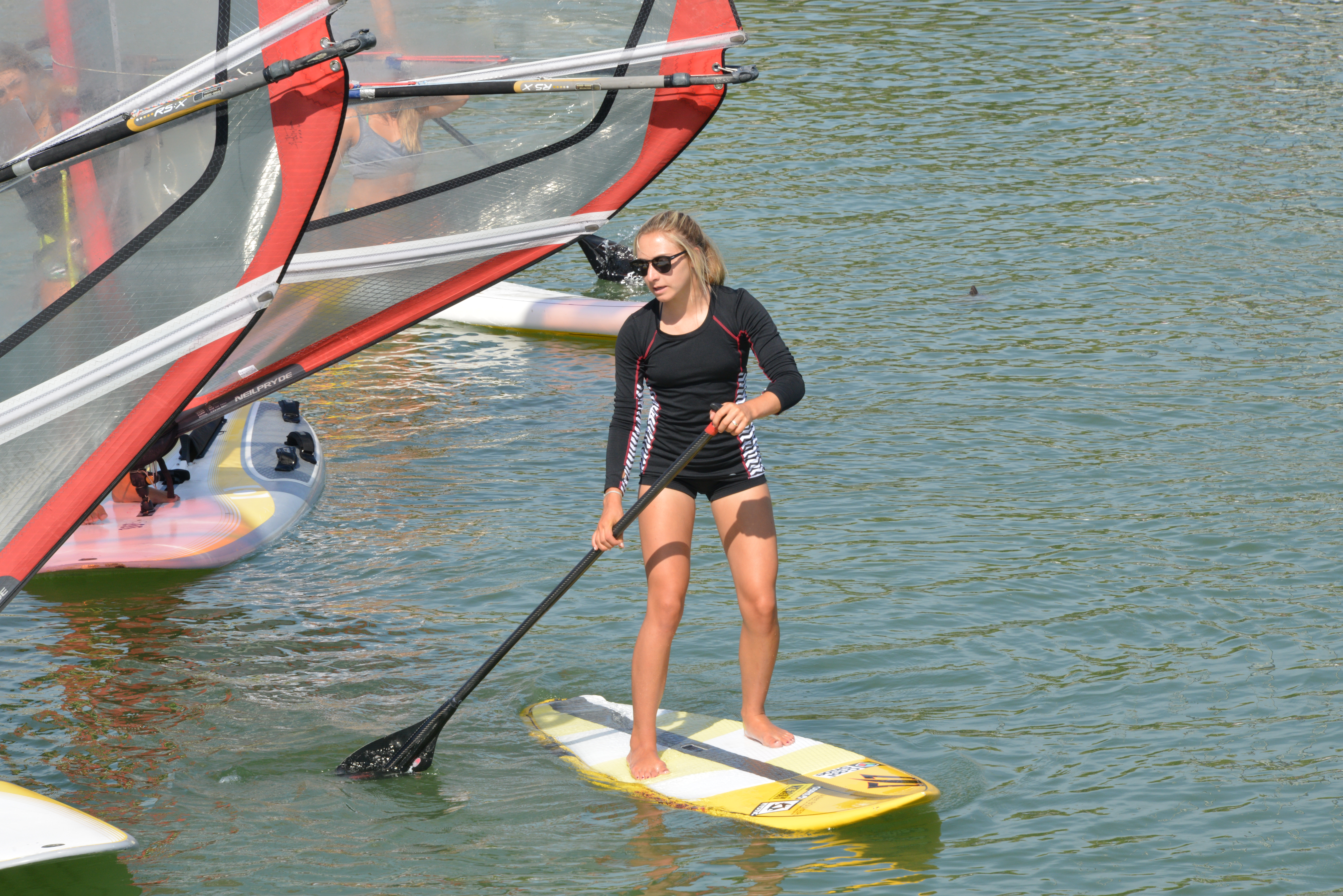 Parade nautique dans le Bassin d’ Échouage en l’honneur des athlètes charentais-maritimes des Jeux Olympiques d’été de Rio 2016 (XXXIer Olympiade). Violette Dorange sur une planche à rame (stand up paddle board). A la fête donnée en leur honneur seulement Charline Picon (voile, planche à voile RS: X), Sarah Steyaert (voile, 49er Fx) et Mathilde de Kérangat (voile, laser radial) sont venues. En revanche, Jonathan Lobert (voile, finn), Joris Daudet (BMX) et Steeve Barry (rugby à 7) ont eu un empêchement. La Rochelle, Charente-Maritime, France.